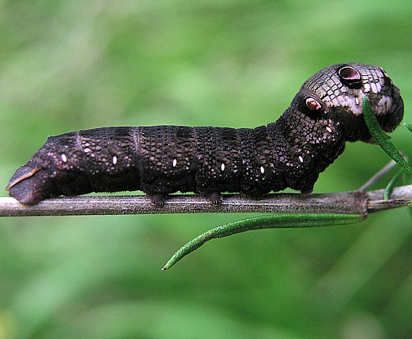 Raupe des Kleinen Weinschwärmers (Deilephila porcellus), aufgenommen am 18. August 2006 am Hoheberg in Großen-Buseck